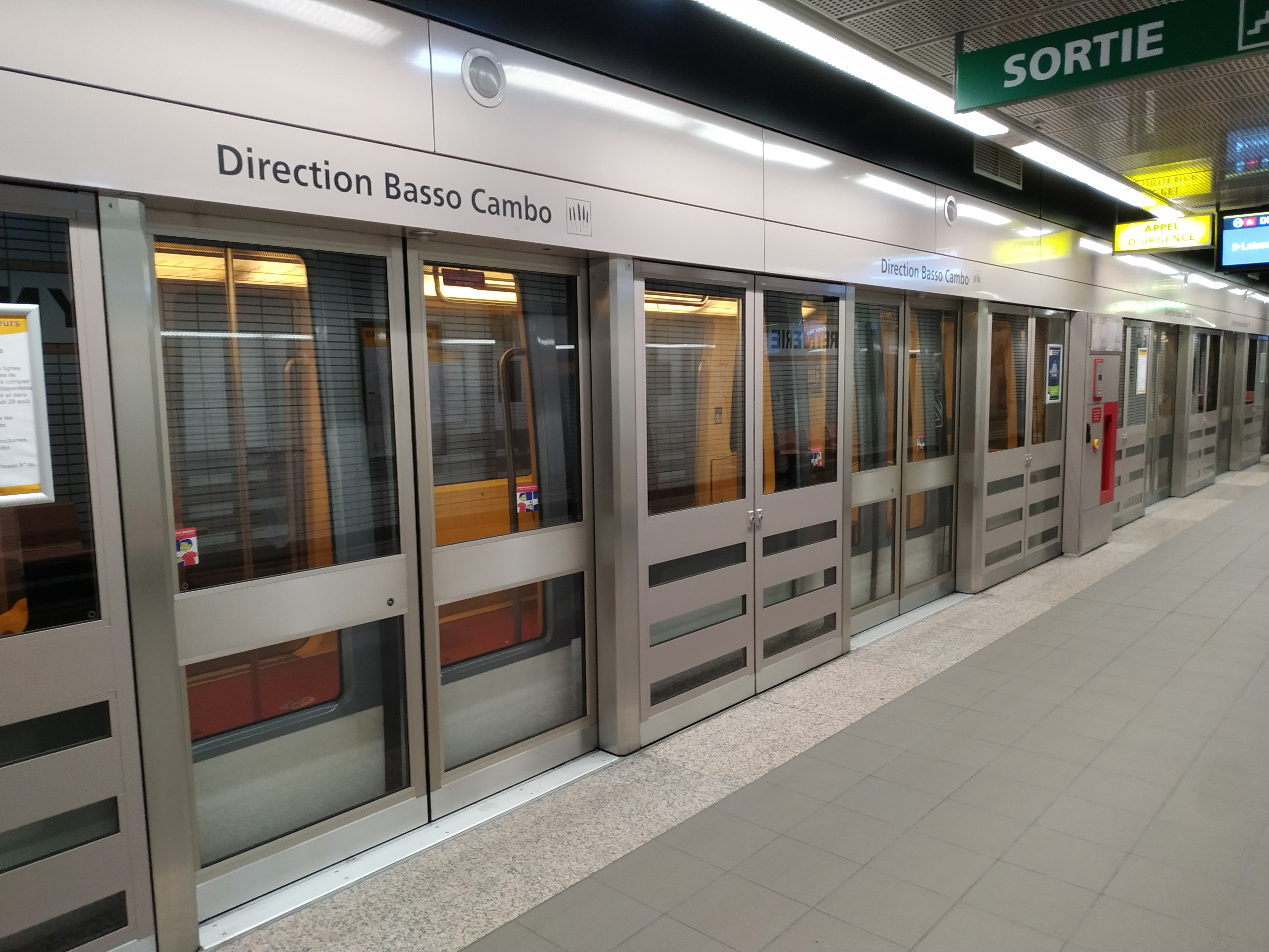 Une rame VAL208 quittant la station Reynerie, sur la ligne A du métro toulousain.